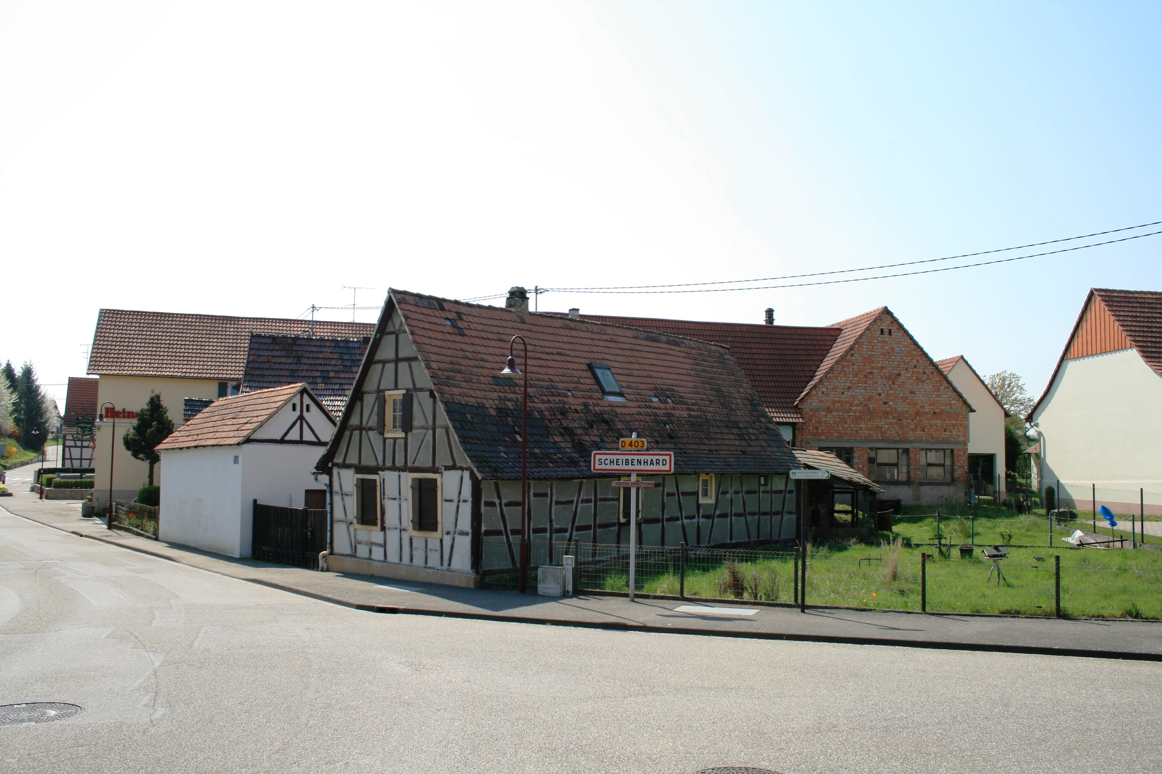 Scheibenhard, Alsace